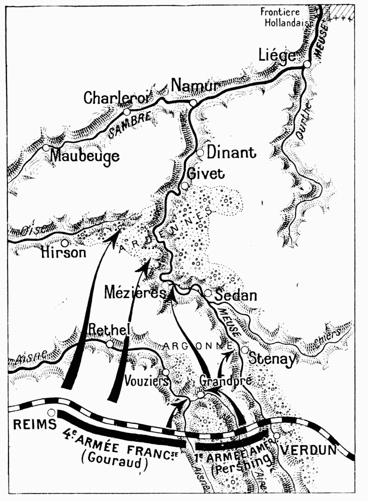 Lageplan der Stellung vom 26. September 1918 rund um Grandpré